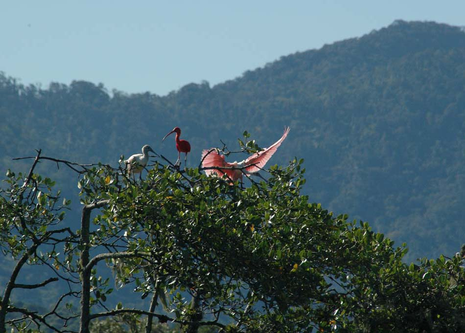 Guarás nas árvores da ESEC Guaraqueçaba.